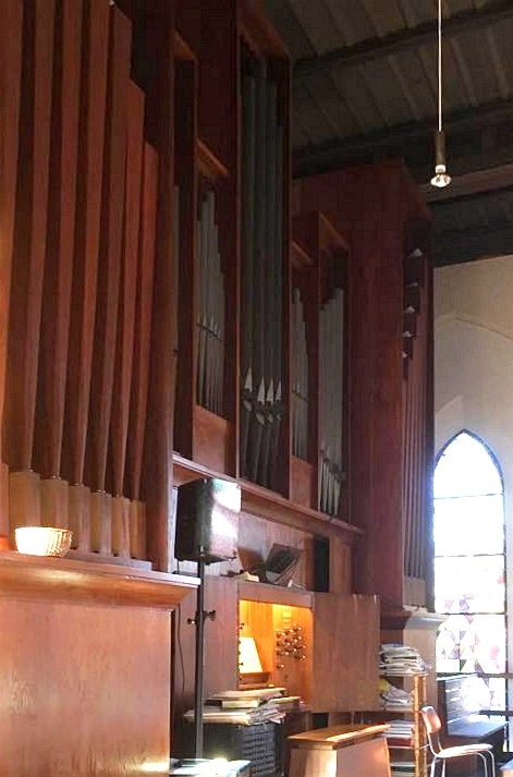 Bernburg, St. Bonifatius, Orgel